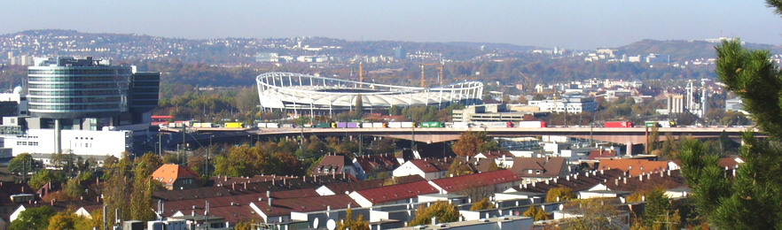 Neckartalviadukt Stuttgart-Untertuerkheim Ostteil Hochbrücke selbst fotografiert von user:Enslin am 31.10.2005